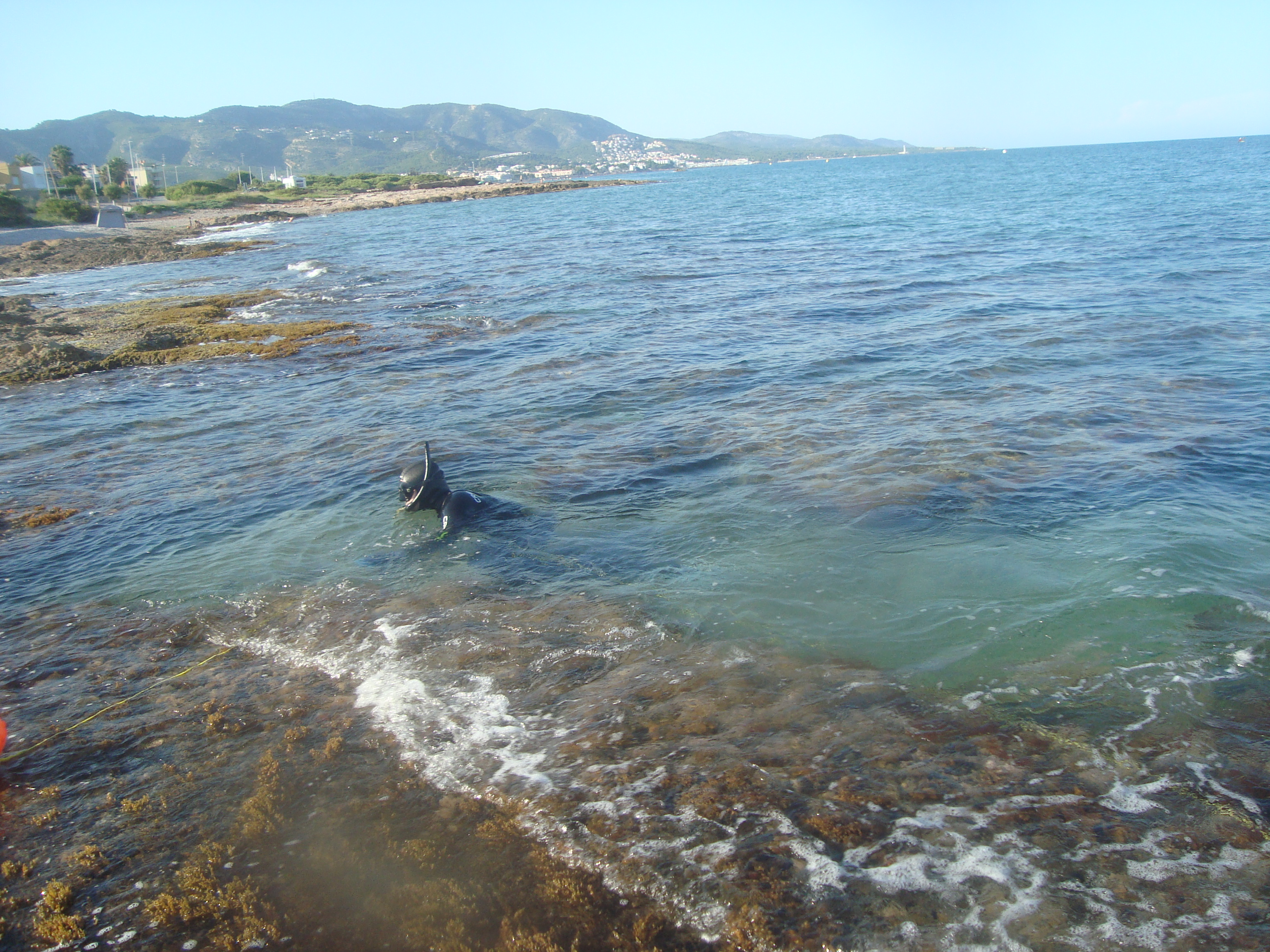 Snorkel, deporte acuático. El Snorkel, es considerado más como una actividad de ocio acuático que un deporte.